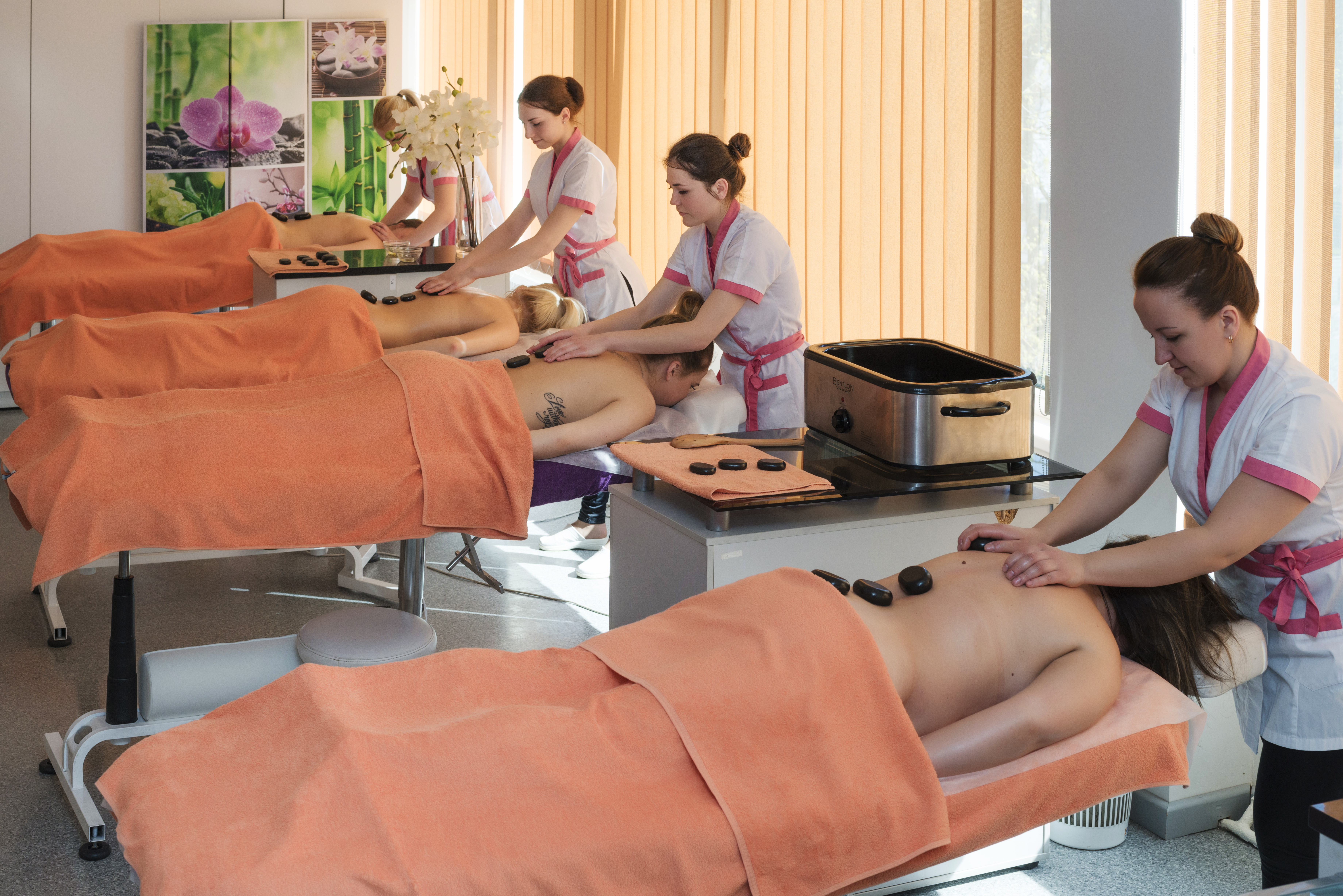 Starptautiskā Kosmetoloģijas koledža